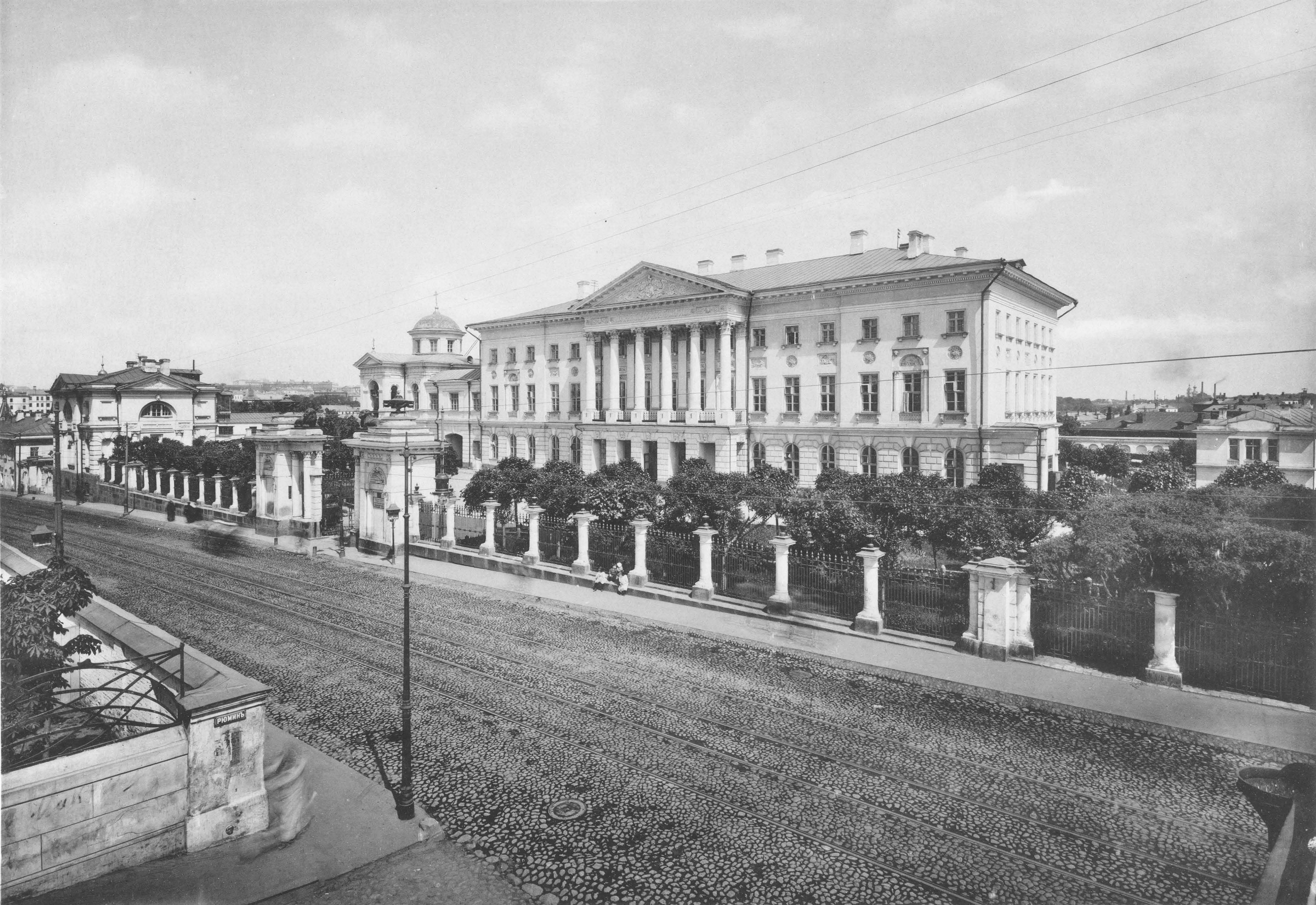 56. Яузская больница на Таганной ул. (Москва)